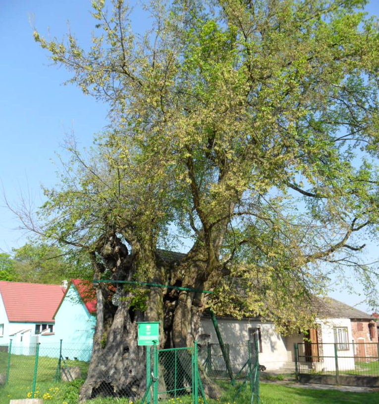 Wiąz szypułkowy.